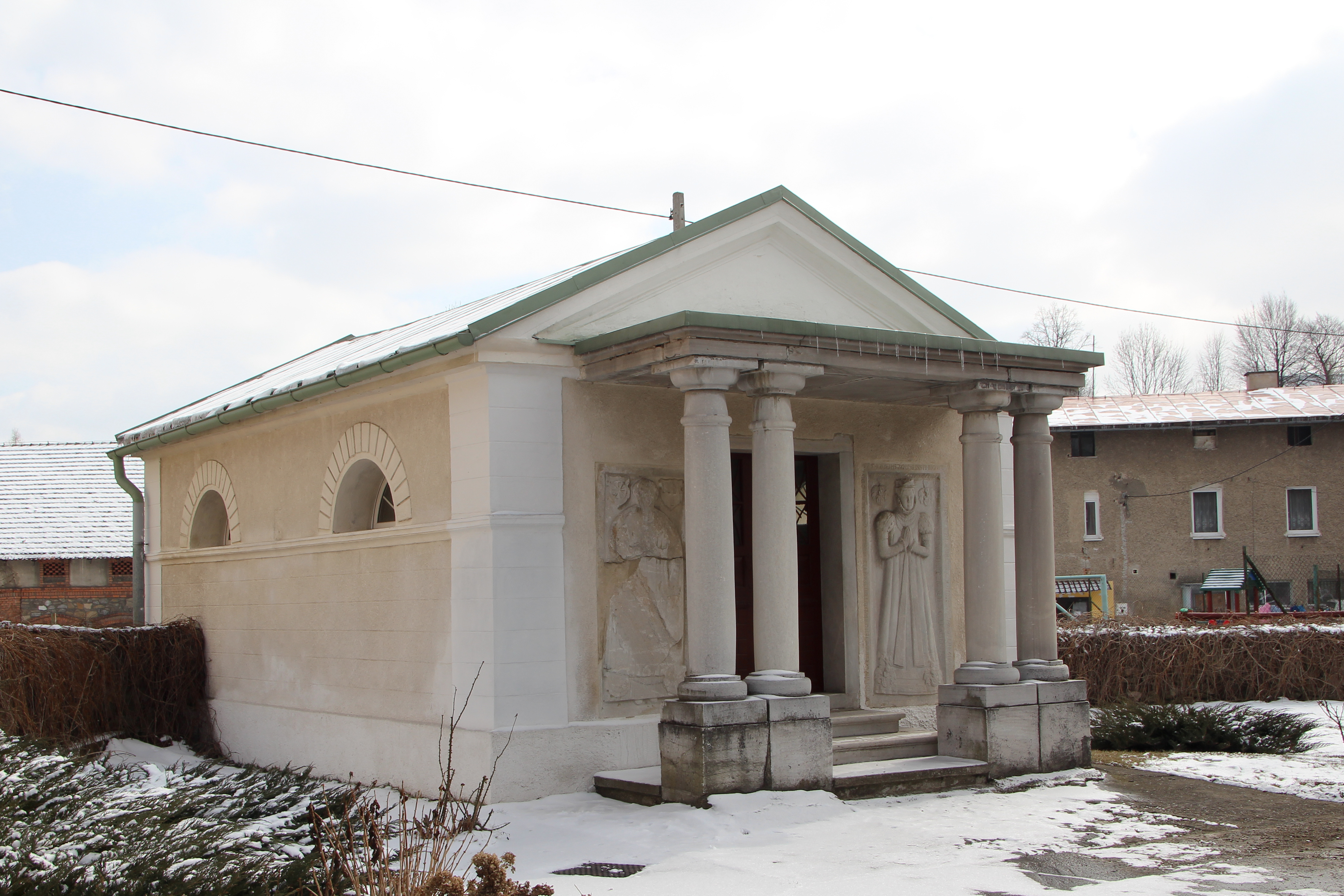 Burgrabice – kaplica cmentarna